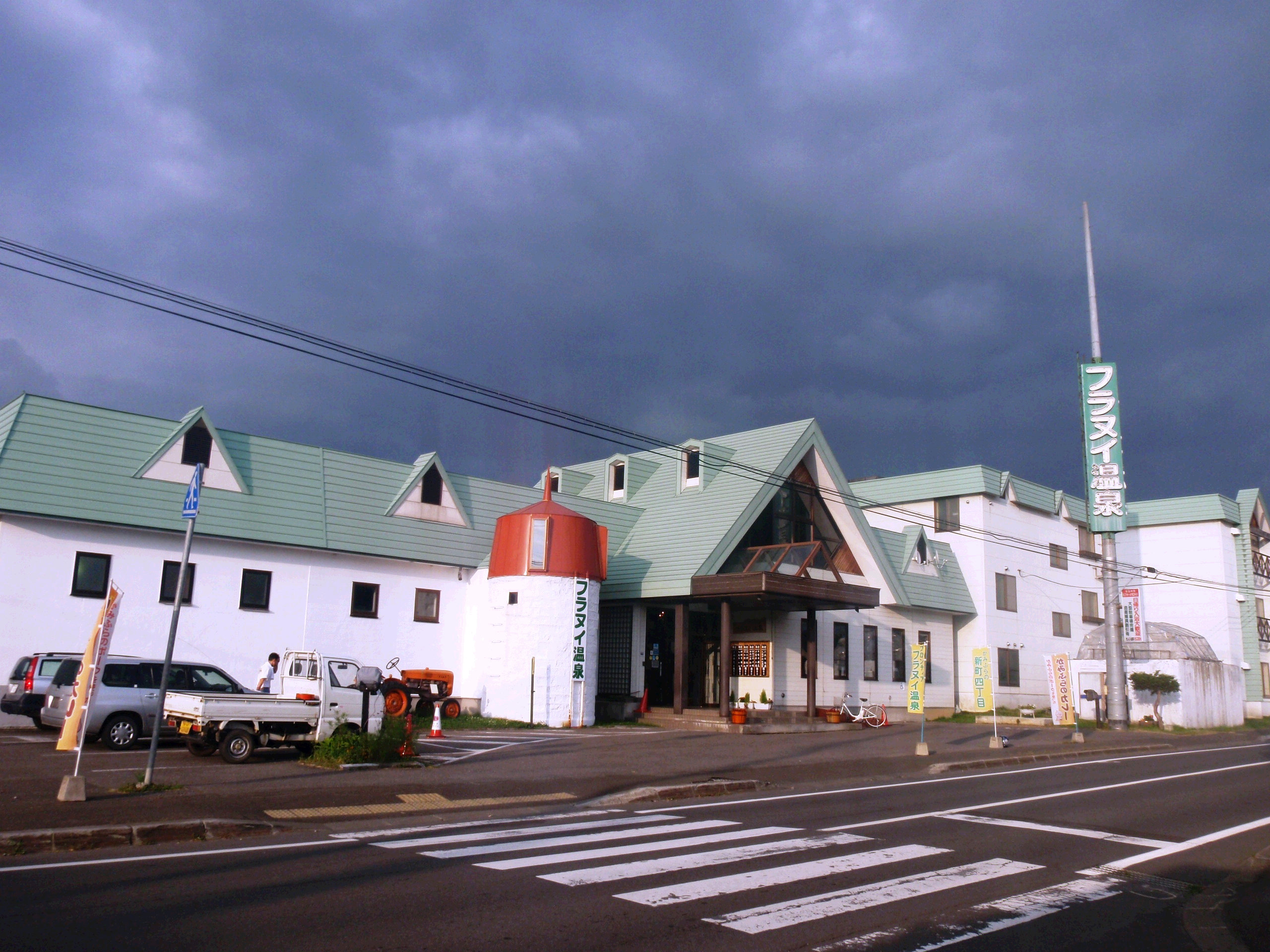 上富良野町のフロンティアフラヌイ温泉